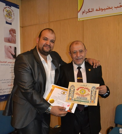 شهادة تقدير بالورق الفرعون من المركز الدولي للطاقة الحيوية سلّمها الدكتور عبد التواب حسين